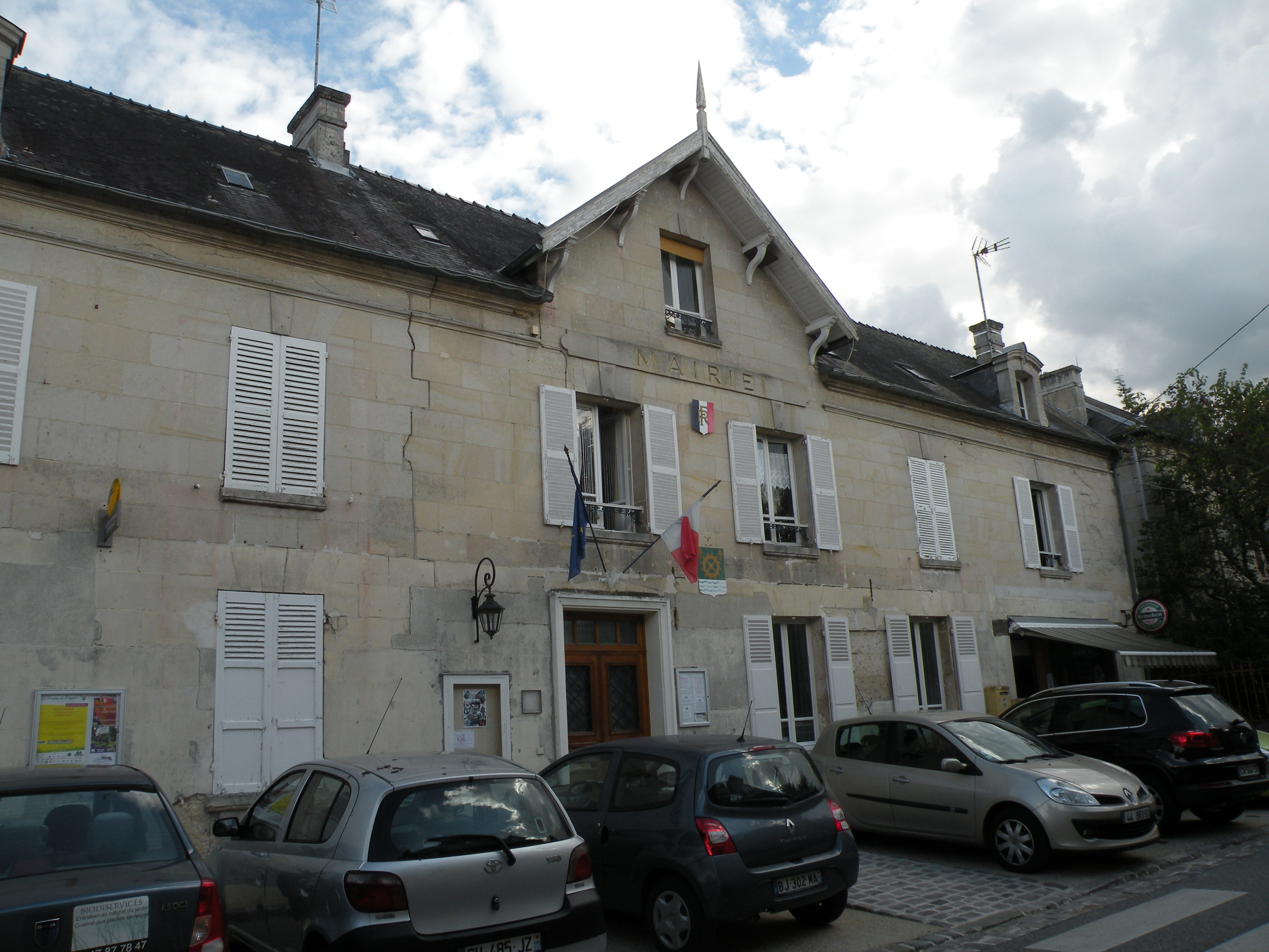 Vieux-Moulin (Oise)